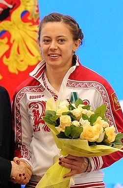 Орденом Дружбы награждена двукратный серебряный призёр Олимпийских игр в биатлоне Ольга Вилухина.